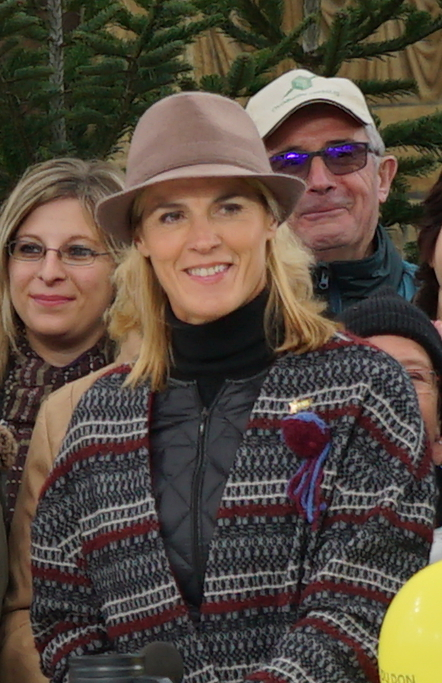 lors du tournage en direct à reims.